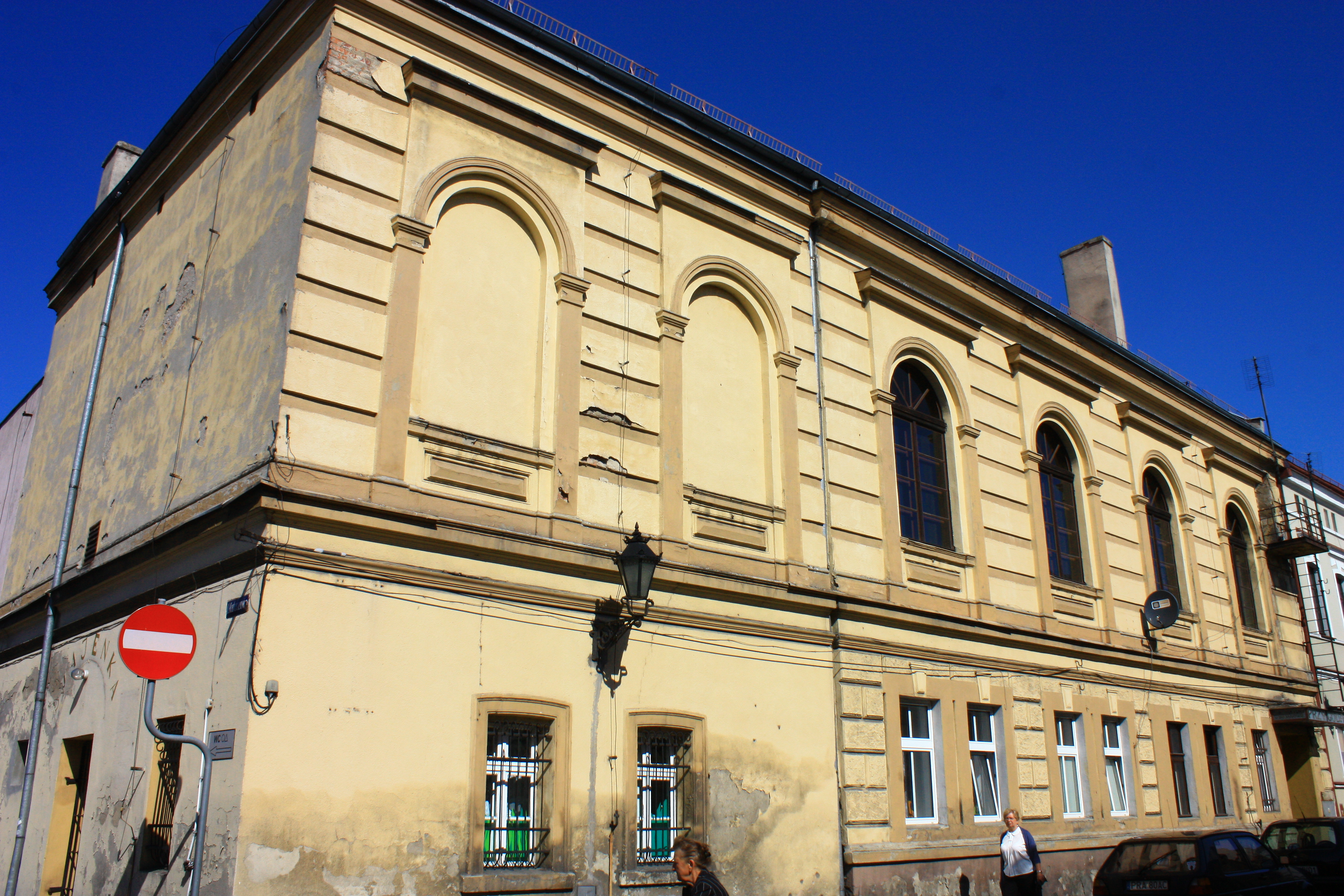 Bojanowo, synagoga, ob. galeria sztuki i mieszkania, 4 ćw. XIX